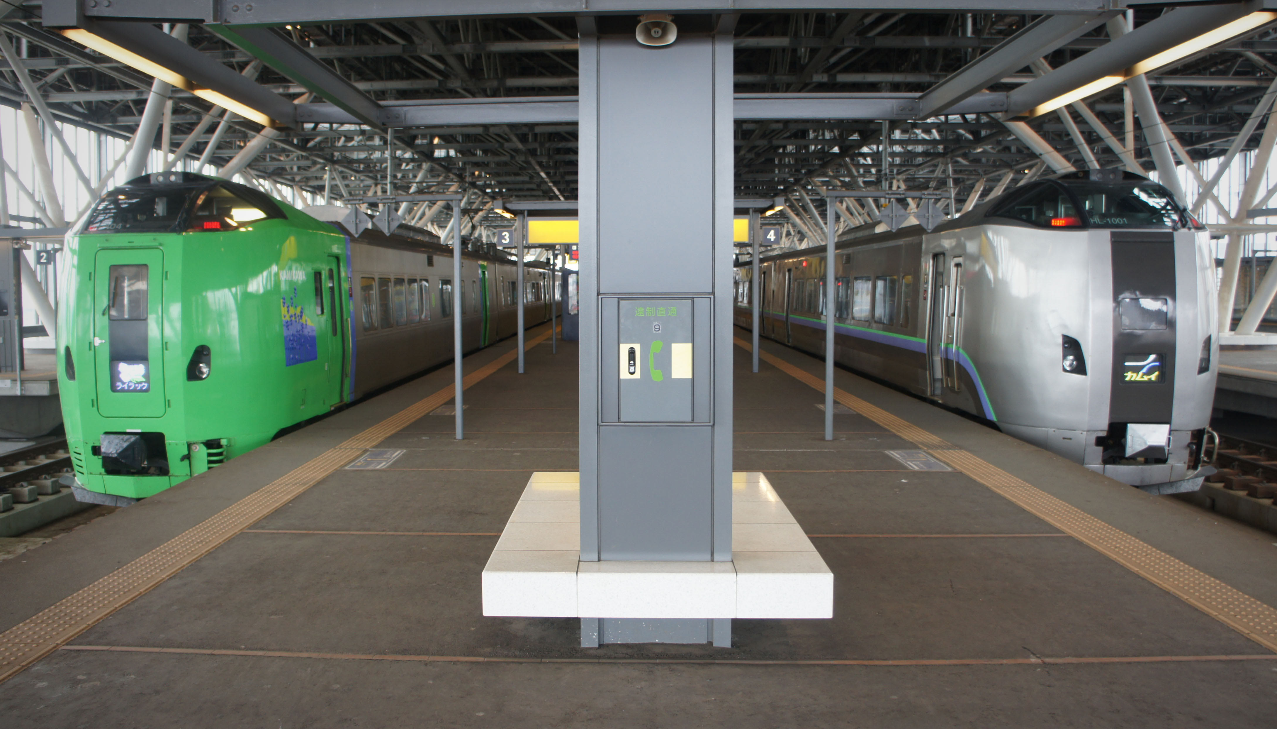 旭川駅に停車中の特急「ライラック」および「カムイ」